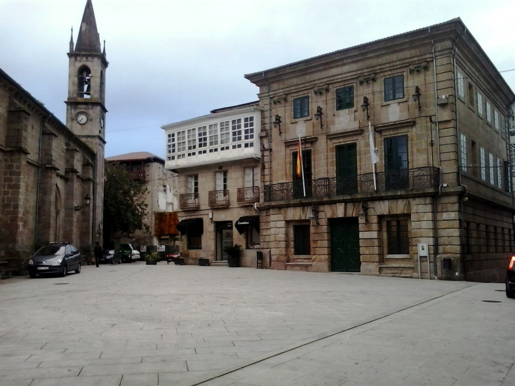 Vista da praza da constitución de Betanzos, croa do Castro de Untia